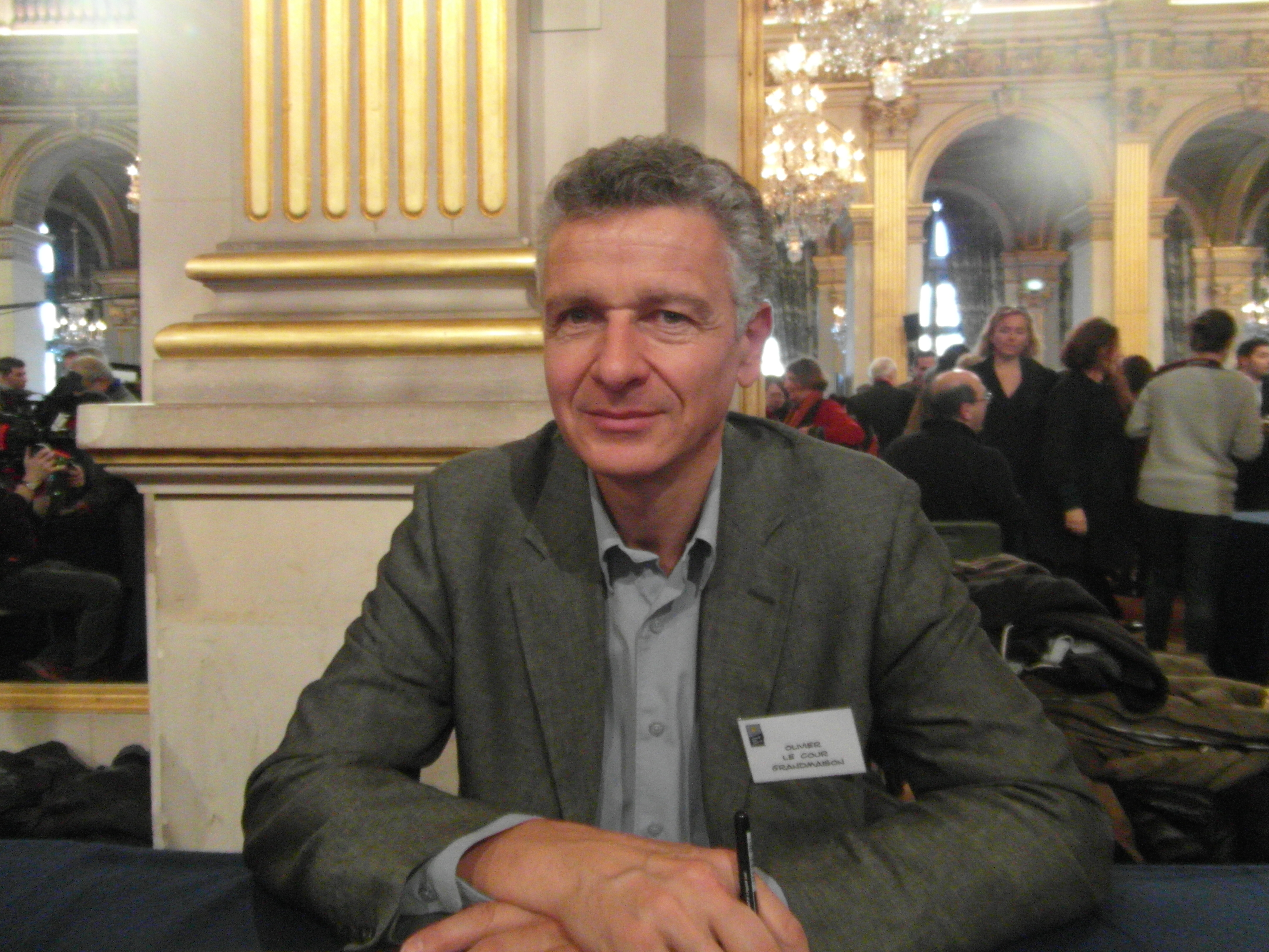 Maghreb des Livres, 7 et 8 février 2015